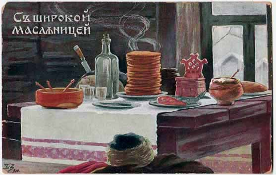 Б. В. Зворыкин. С широкой масленицей. Дореволюционная открытка.